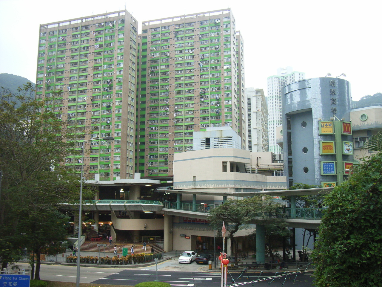 柴灣道 (Chai Wan Road)，是zh:香港東區一條主要zh:道路，位於zh:香港島zh:筲箕灣至zh:柴灣，西接zh:筲箕灣道，東接zh:小西灣道。 Photo Author: User:BLUEAST